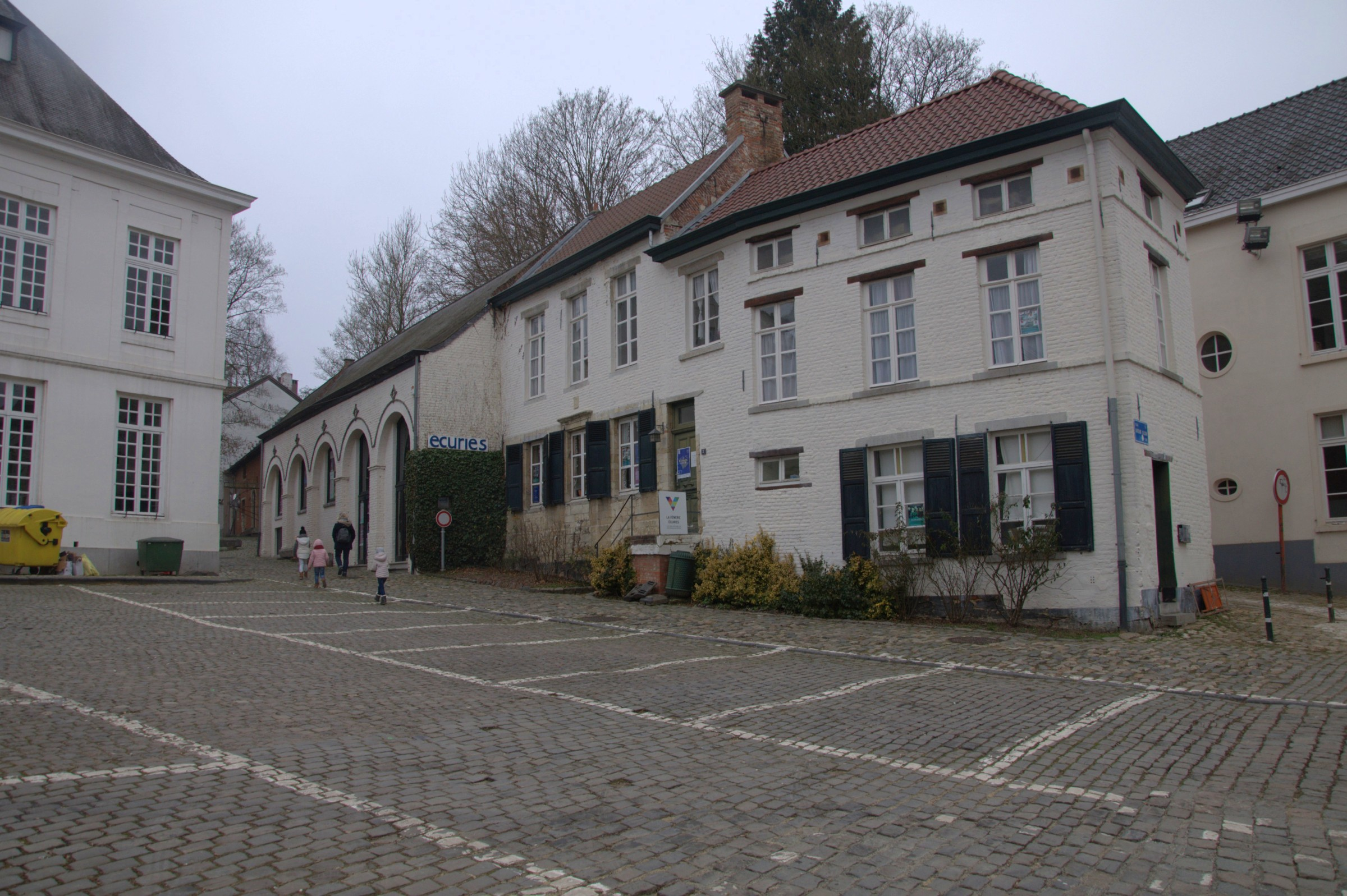 Monument classé de la région bruxelloise